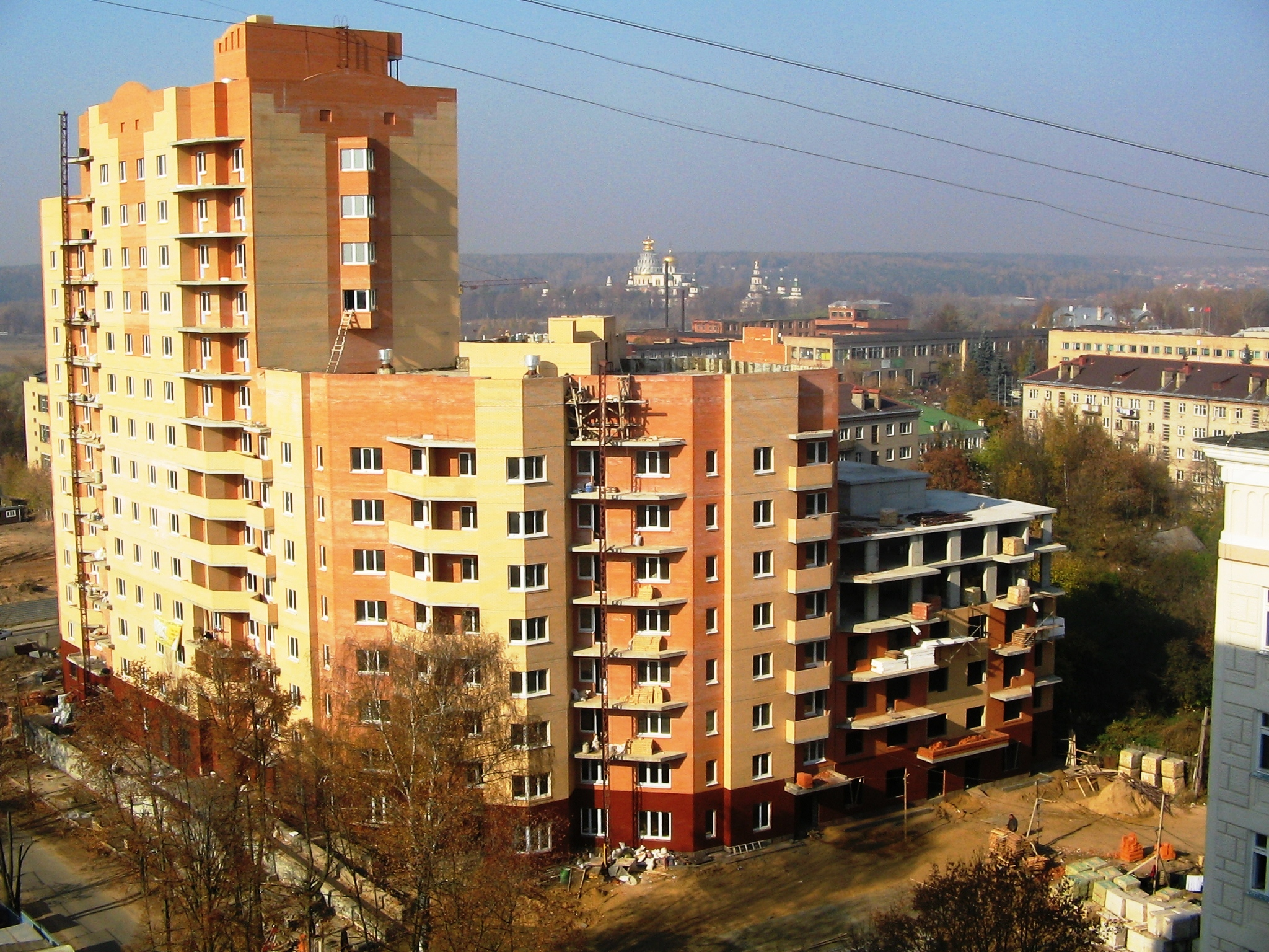 Строительство дома №2 по улице В. Адасько (Истра)